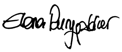 Firma autografa della saltatrice con gli sci italiana Elena Runggaldier. Foto originale modificata da me: trasformata in bianco e nero, luminosità ridotta, contrasto aumentato, sfondo sbiancato.